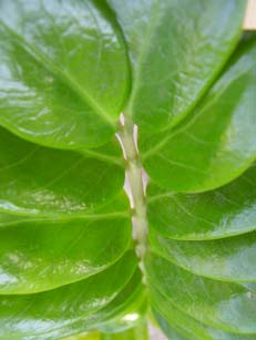 Zamioculcas zamiifolia levele közelről